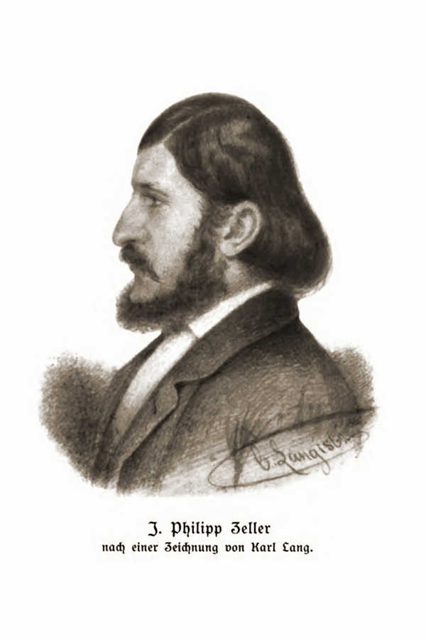 Johann Philipp Zeller (1824-1862) nach einer Kreidelithografie von Karl Lang